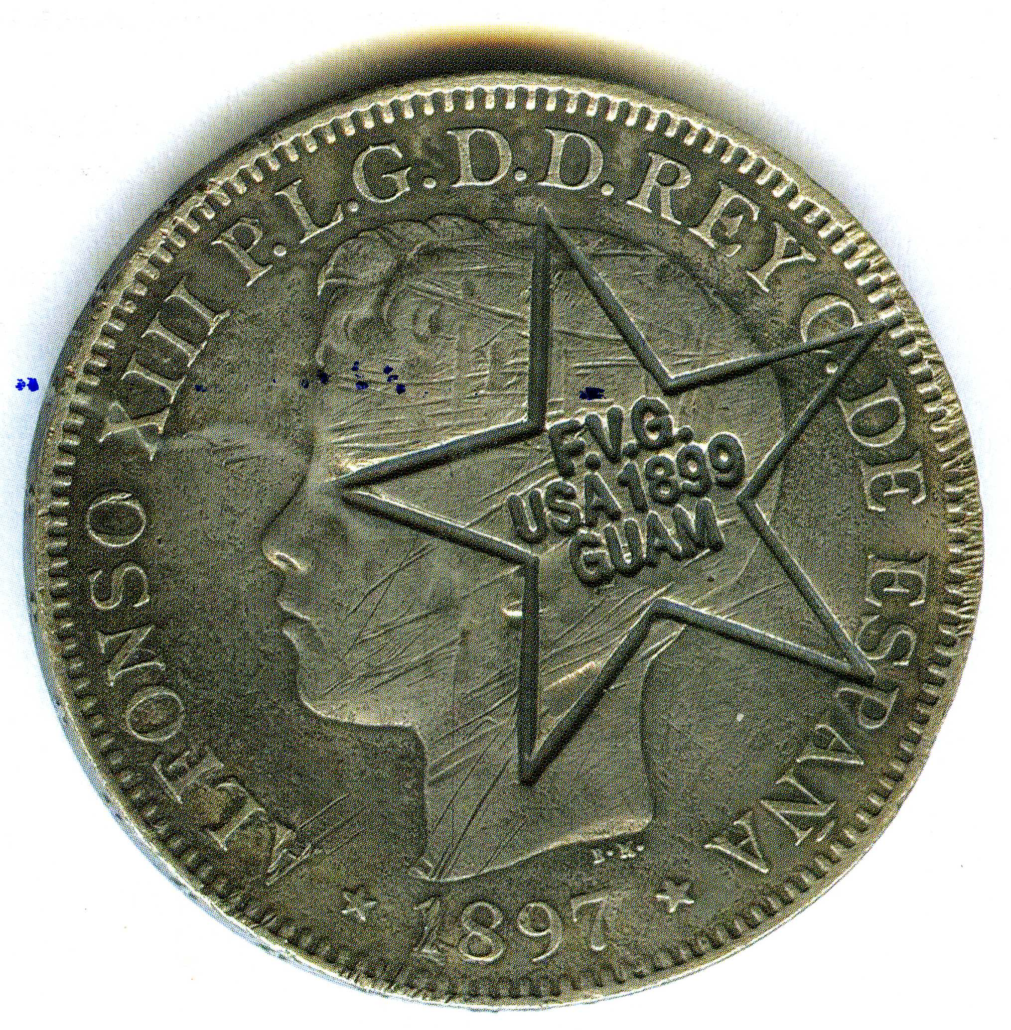 Moneda utilizada en el territorio de Guam